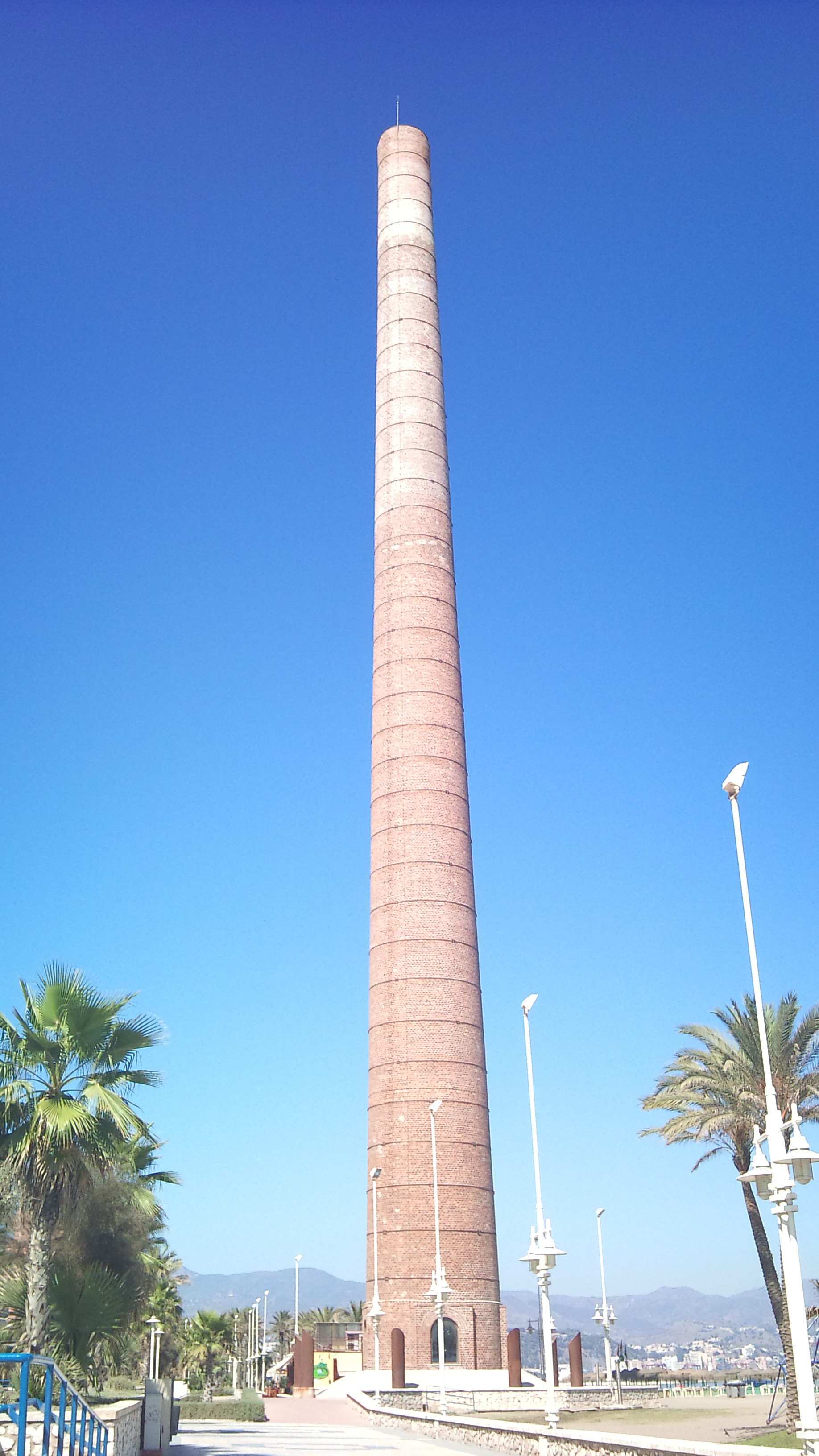 Chimenea de la Central Térmica de la Misericordia, Torre Monica. Oeste de Málaga, España.